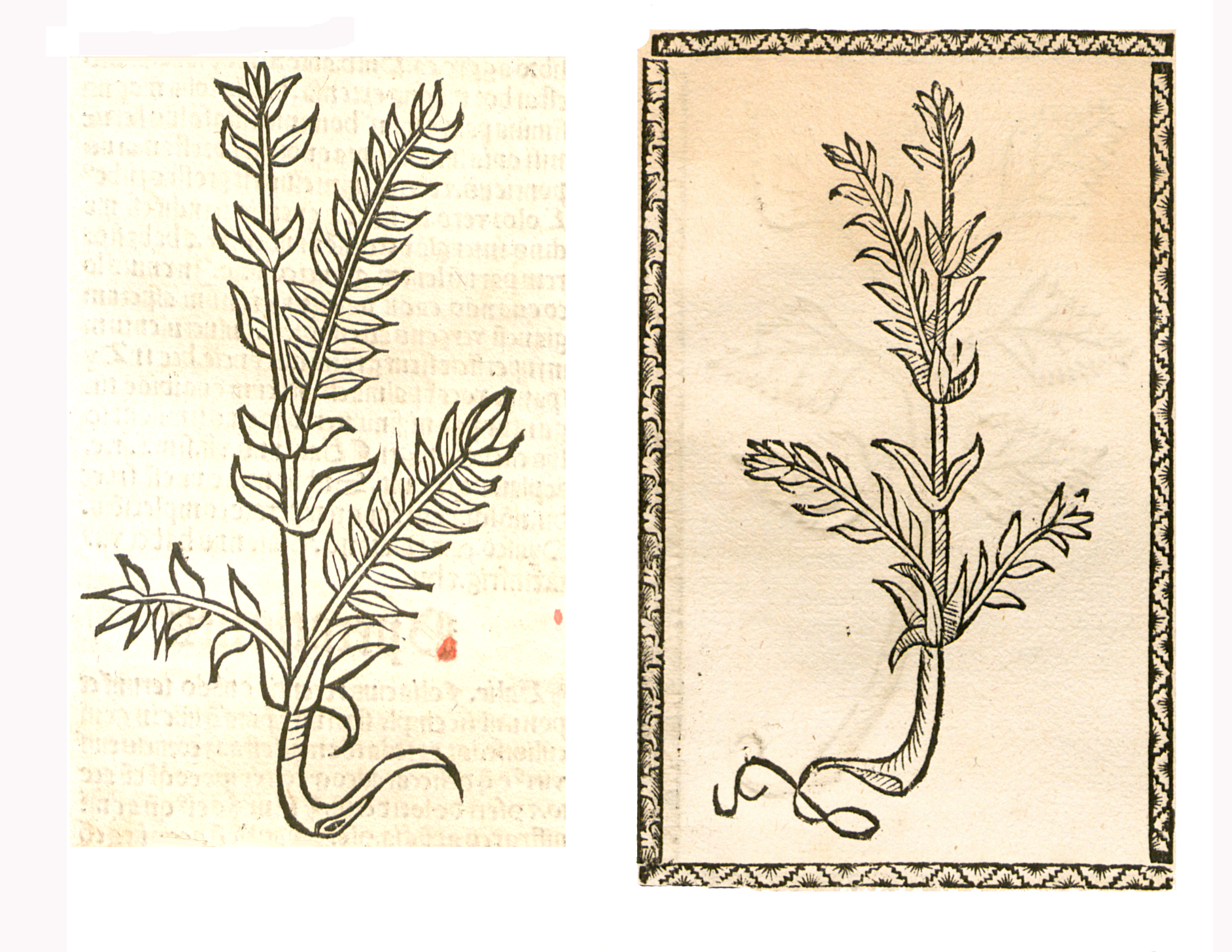 Abbildung von Mer Hirß (Lithospermum officinale)